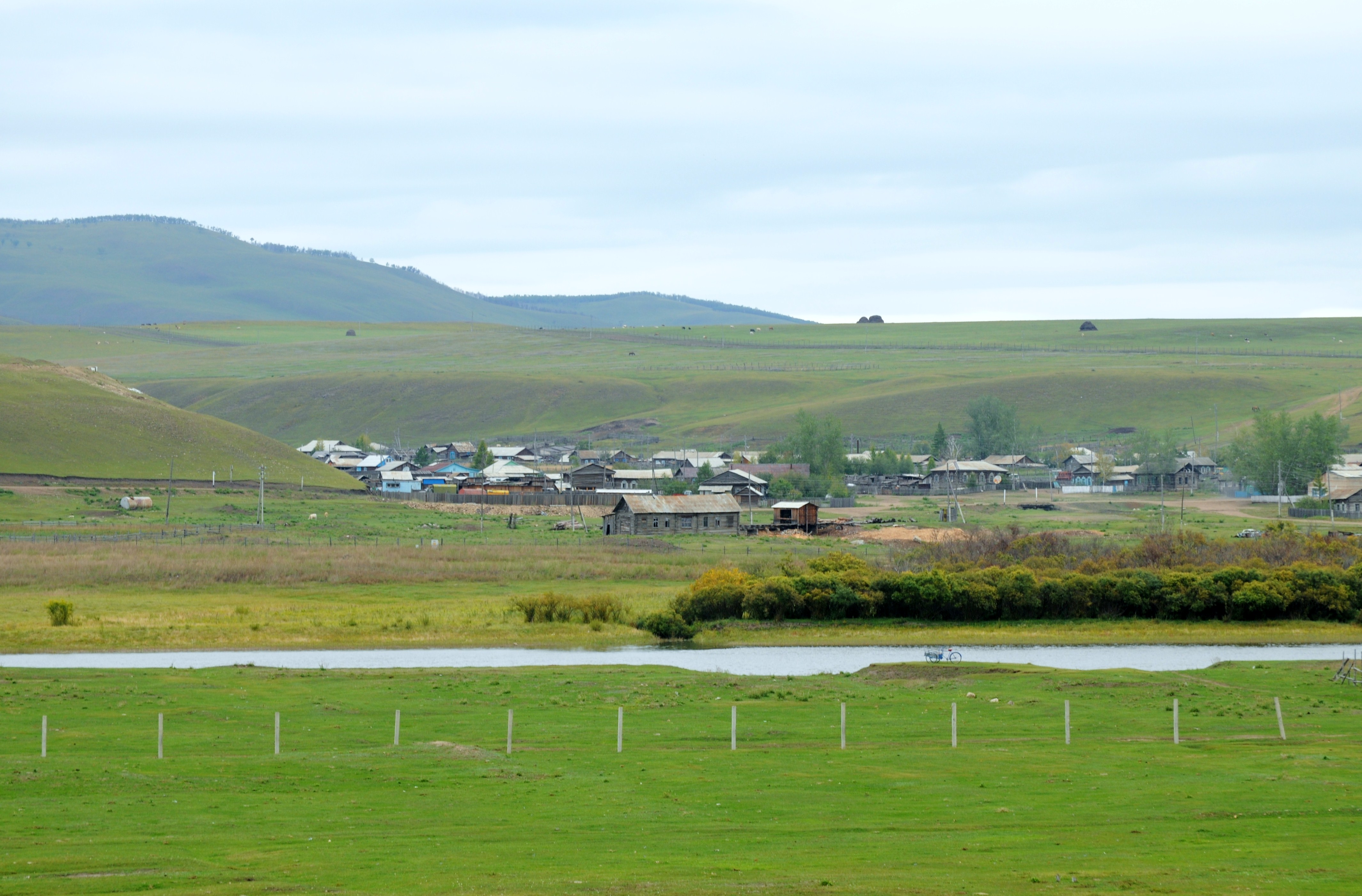 室韦 额尔古纳河对岸的俄罗斯村庄